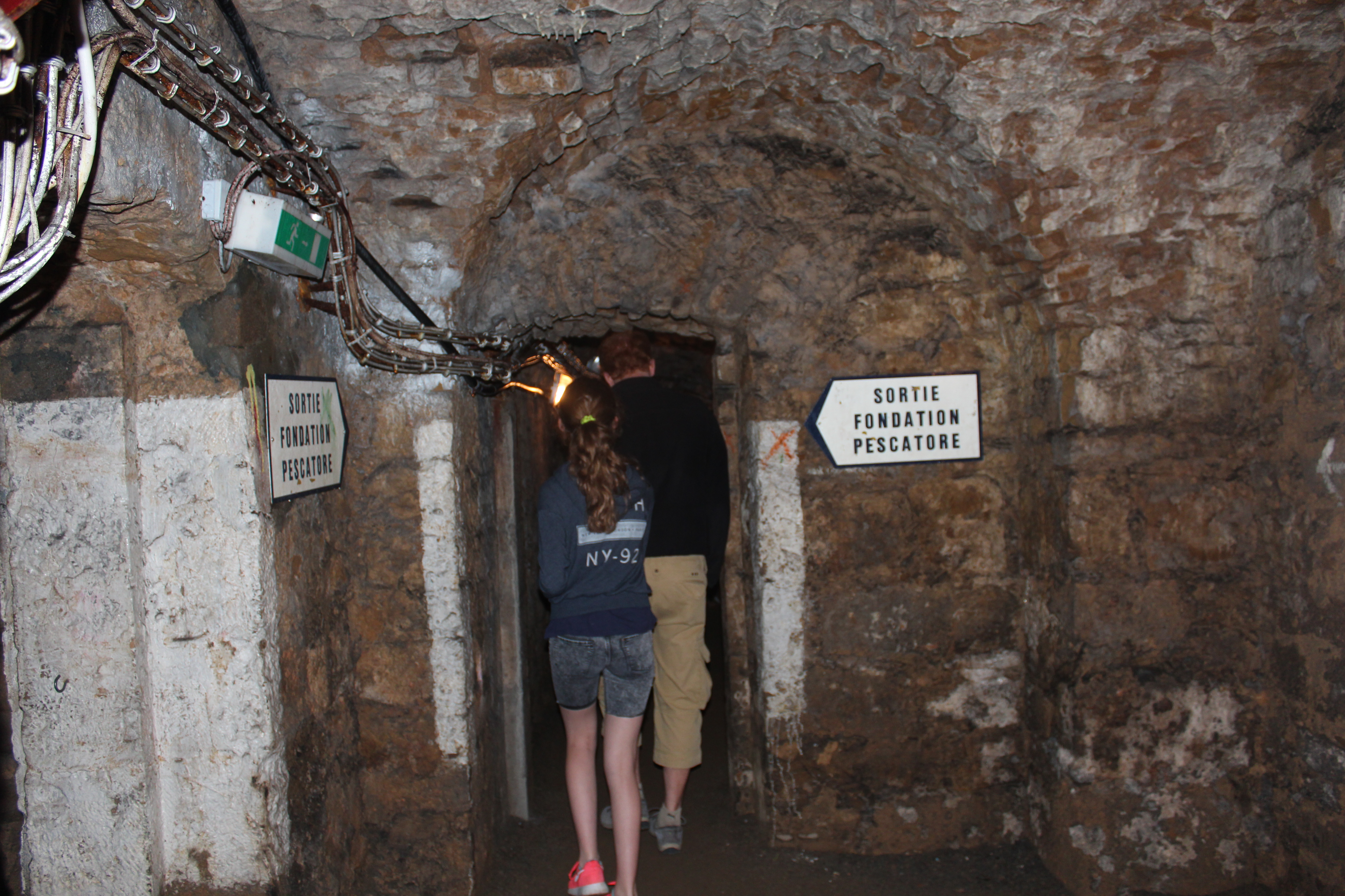 Casemate de la Redoute Marie, en dessous de la Fondation Pescatore, à Luxembourg-Ville.